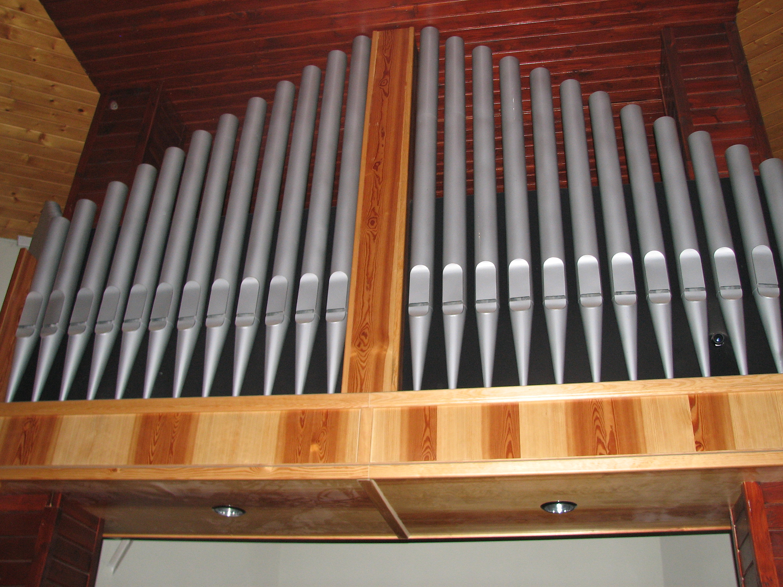 organy w parafii św. Rodziny w Tychach